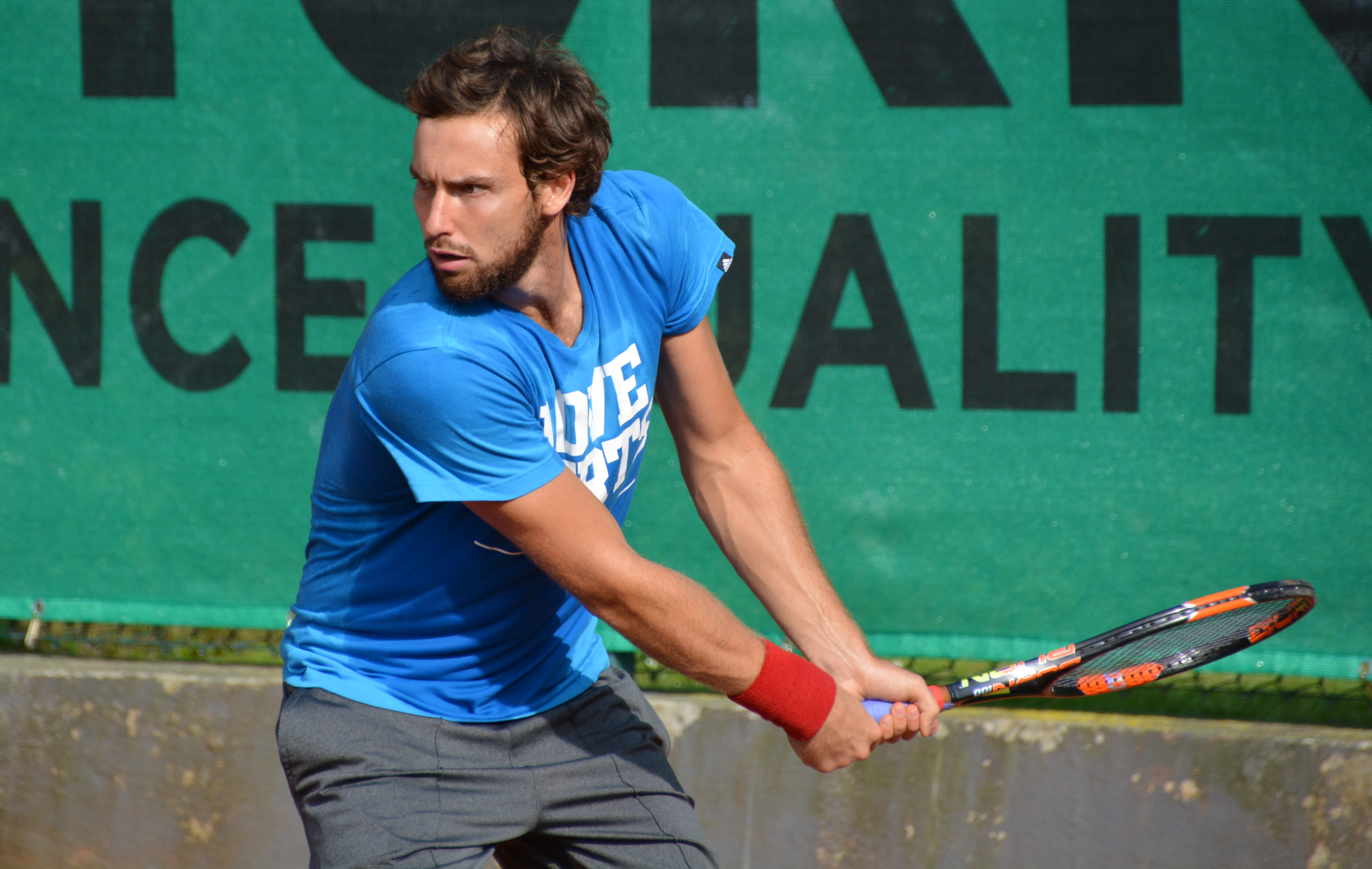 ATP Båstad 2015